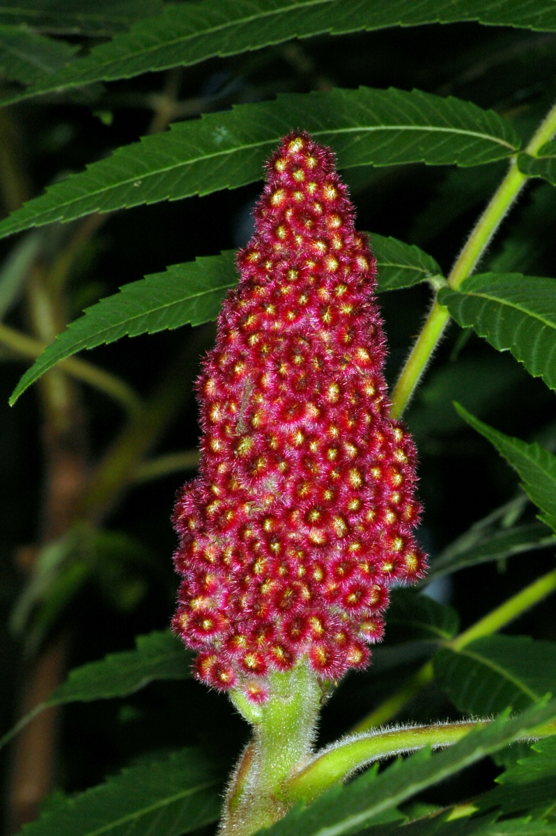 Rhus typhina, Idstein, Hessen, Deutschland